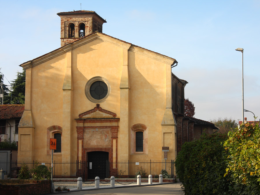 Chiesa di Santa Maria del Campo presso l'omonima frazione di Mortara (PV)